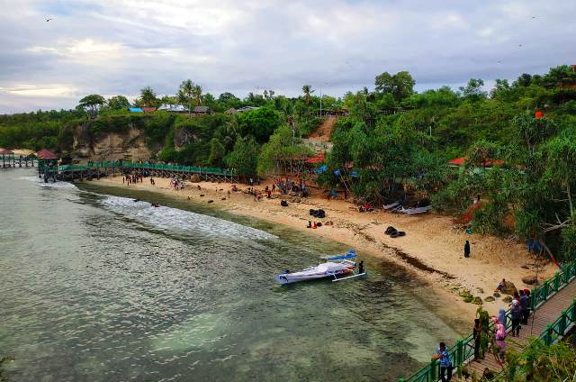 Pantai Dato di Majene, Sulawesi Barat/ Sumber